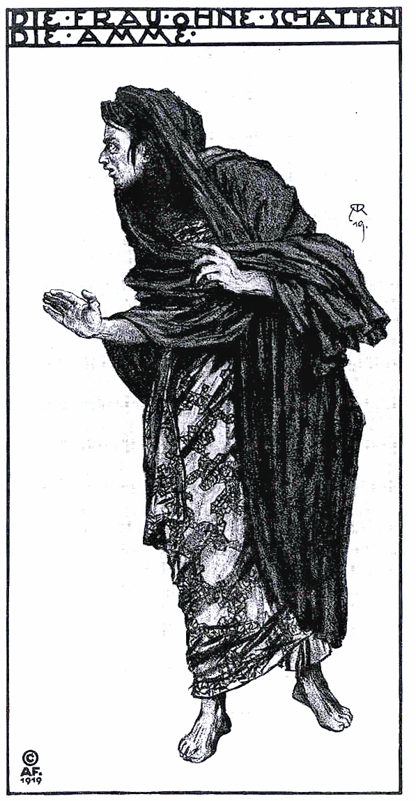 Kostuum voor der Amme van Alfred Roller (1864–1935) (Premiere van opera Strauss: Die Frau ohne Schatten)